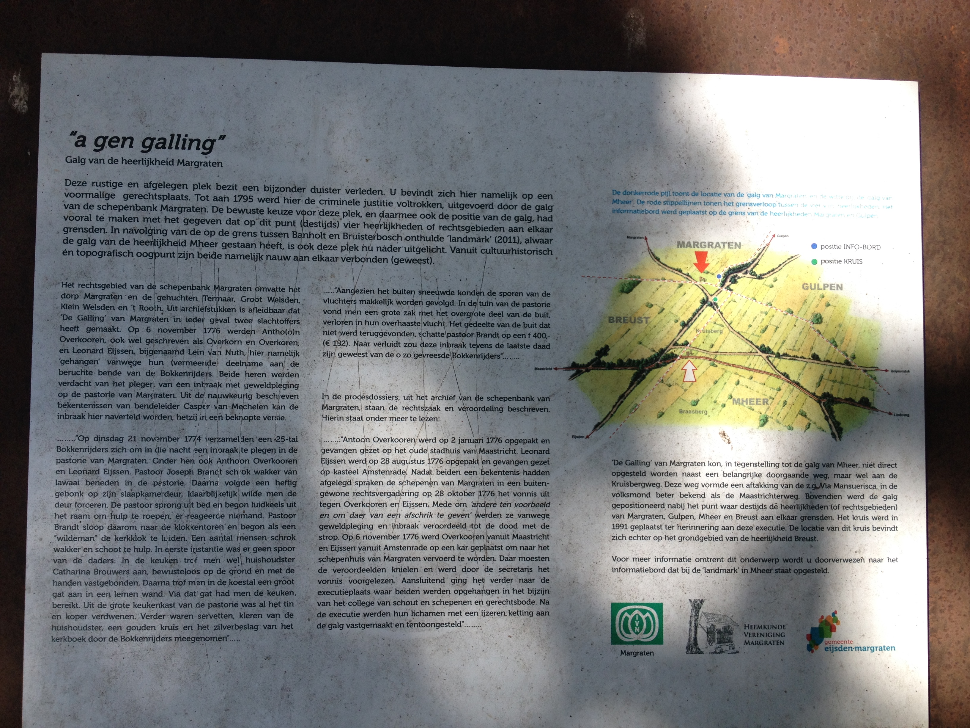 Informatiebord bij de voormalige Galg van Margraten